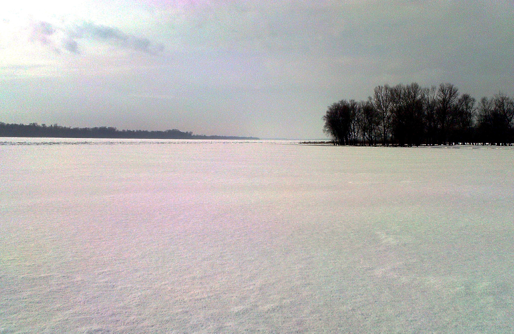 Посреди Днепра